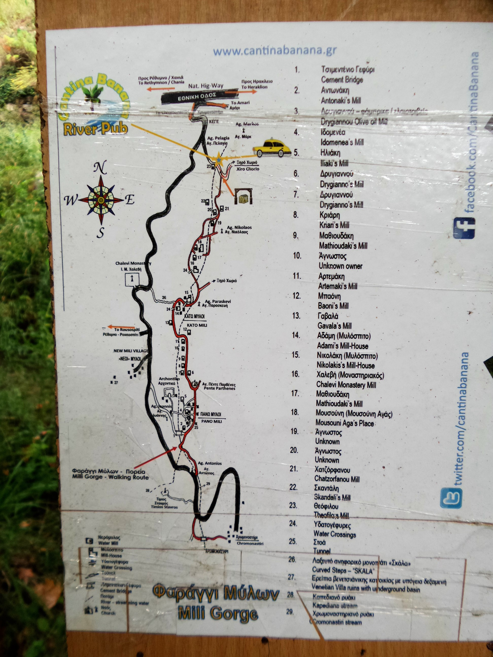 Hinweistafel - Wegweiser in der Myli-Schlucht